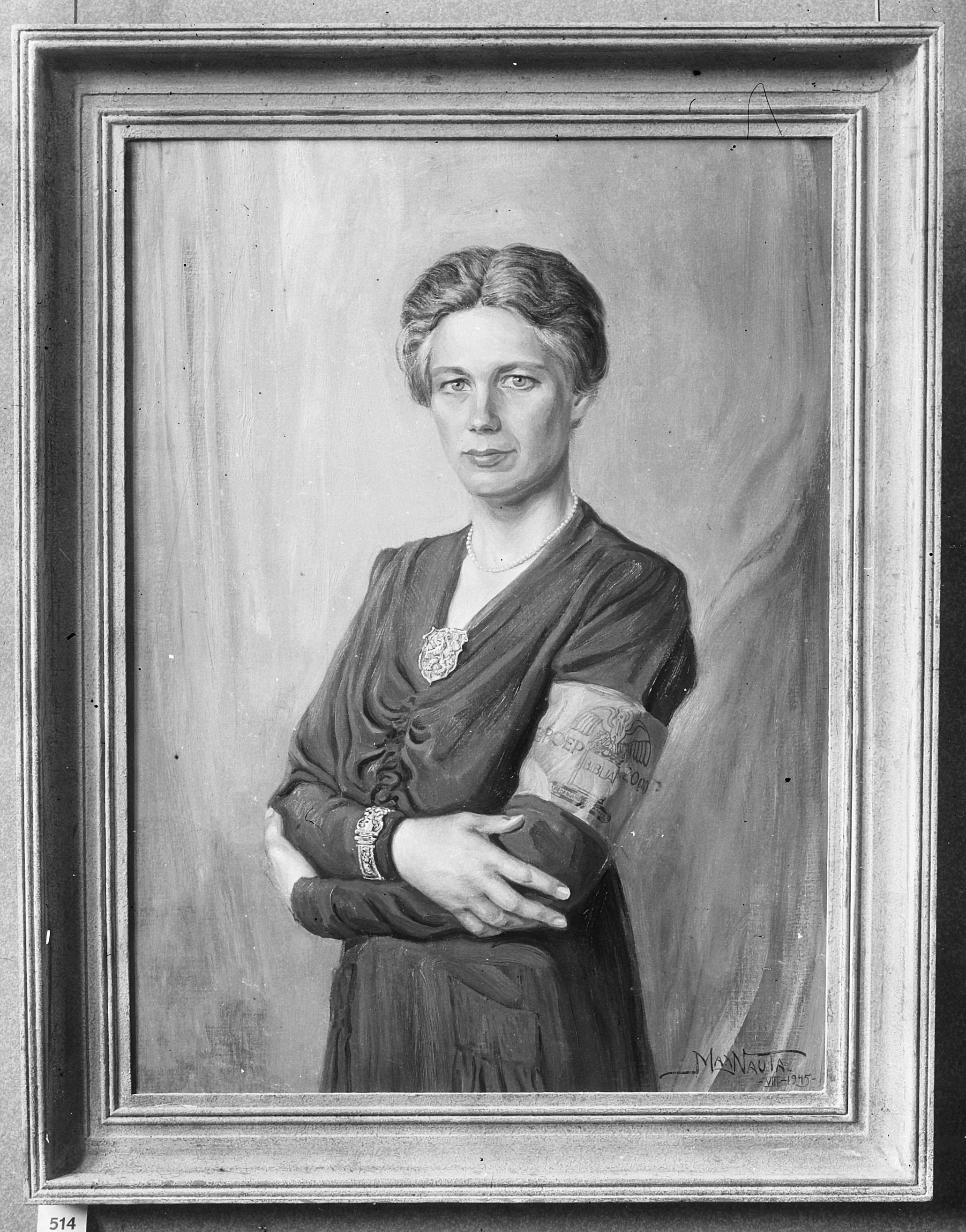 Collectie / Archief : Fotocollectie Anefo Reportage / Serie : [ onbekend ] Beschrijving : Portret van Jacoba van Tongeren door Max Nauta, gedateerd augustus 1945 Annotatie : Codenaam "Juffrouw 2000". Zij draagt een armband met opschift "Groep 2000" en een wapen bestaande uit een Pelikaan met de tekst "Biblia". Op haar borst een grote broche met het rijkswapen Datum : 1945 Trefwoorden : kunst, tweede wereldoorlog, verzetsstrijders Persoonsnaam : Tongeren, Jacoba van Fotograaf : Fotograaf Onbekend / Anefo Auteursrechthebbende : Nationaal Archief Materiaalsoort : Glasnegatief Nummer archiefinventaris : bekijk toegang 2.24.01.09 Bestanddeelnummer : 900-9750